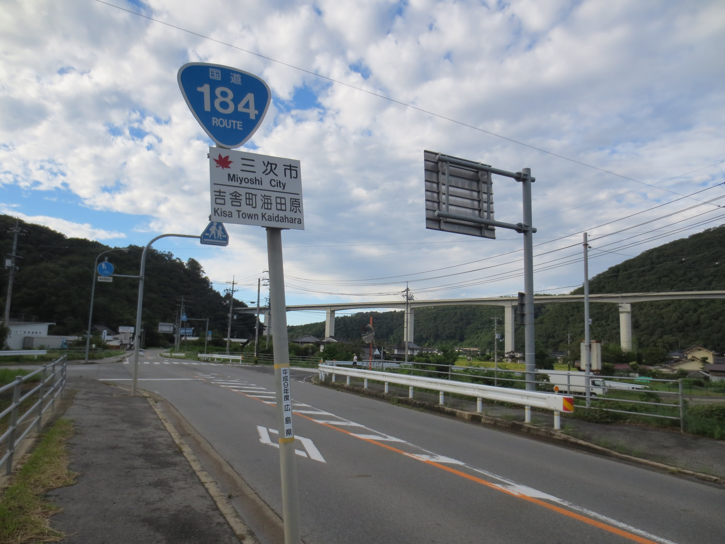 三次市吉舎町海田原付近の国道184号。